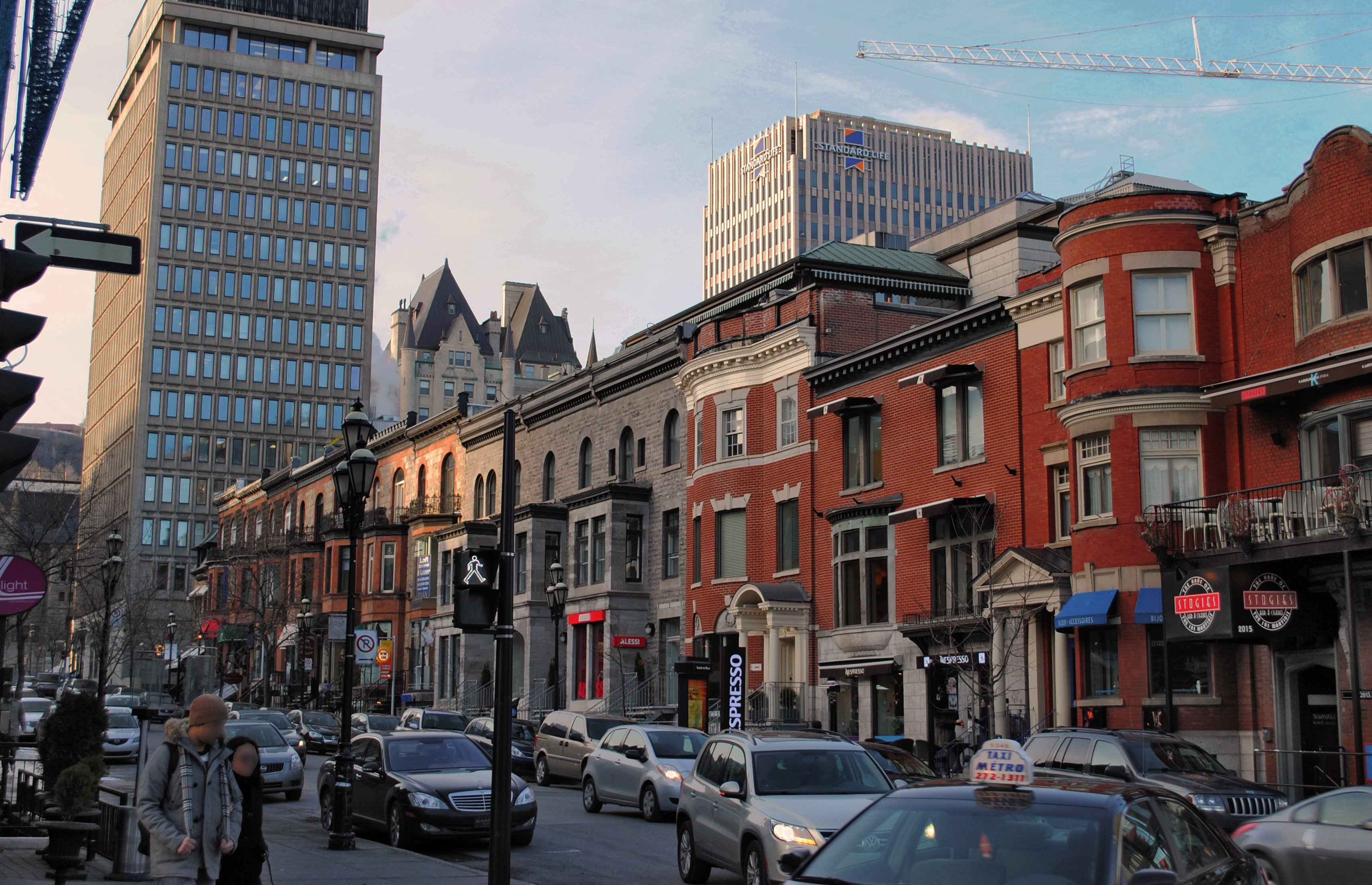 Montreal - Rue Crescent